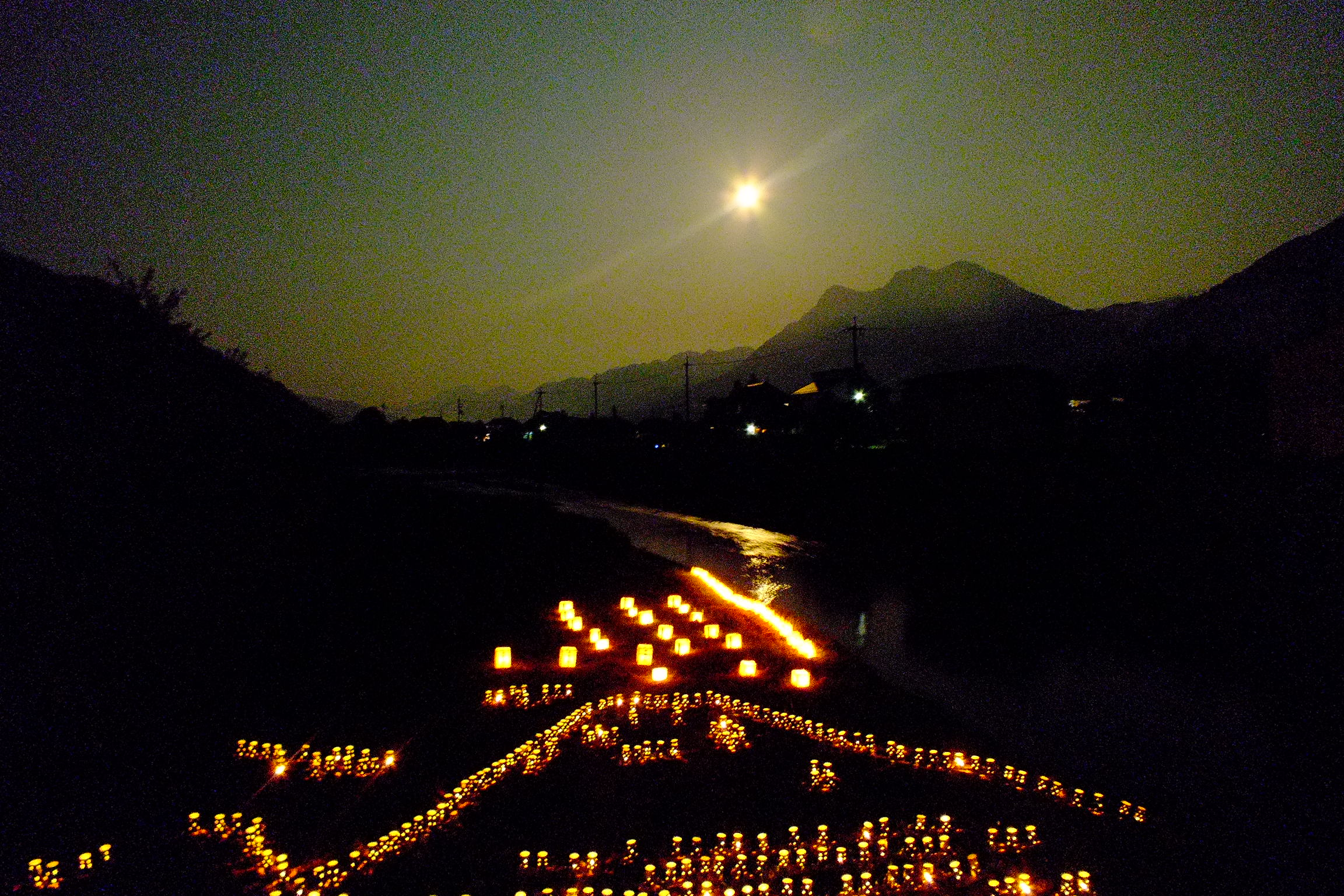 2015-07-31Minazuki-Festival Kokuryo,Tamba,Hyogo-Japan 国領水無月祭り